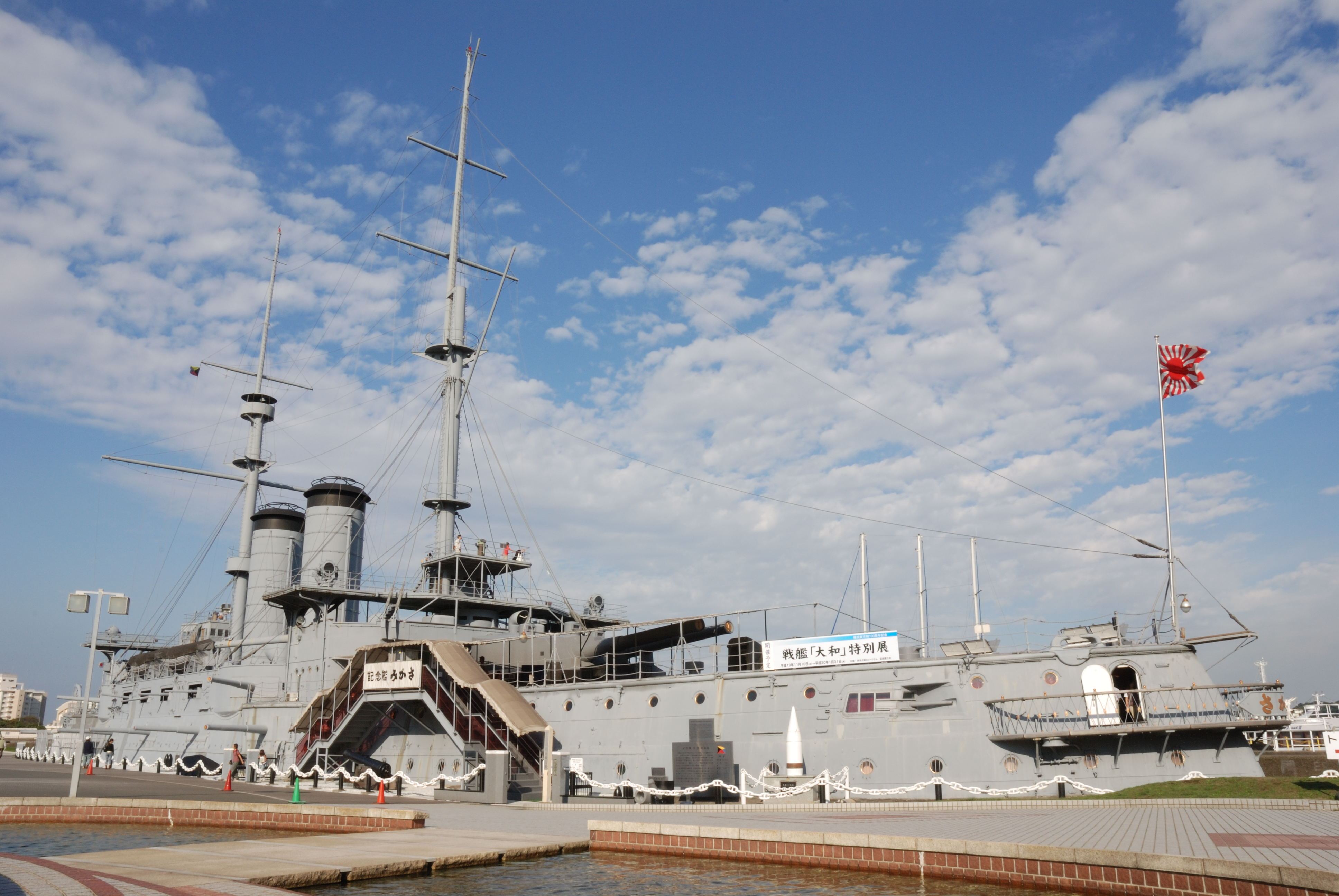 Mikasa